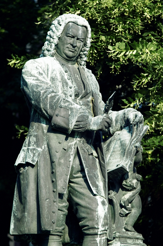 Bachdenkmal Eisenach, 2004